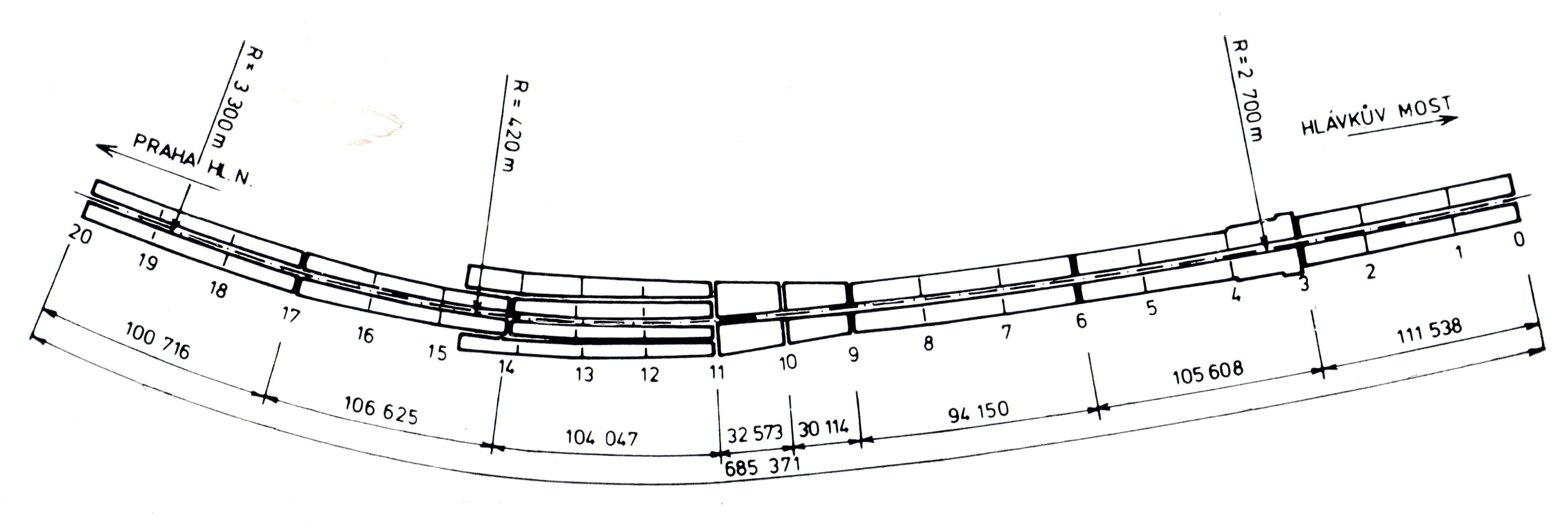 Půdorys stavby vyrobené ocelové konstrukce